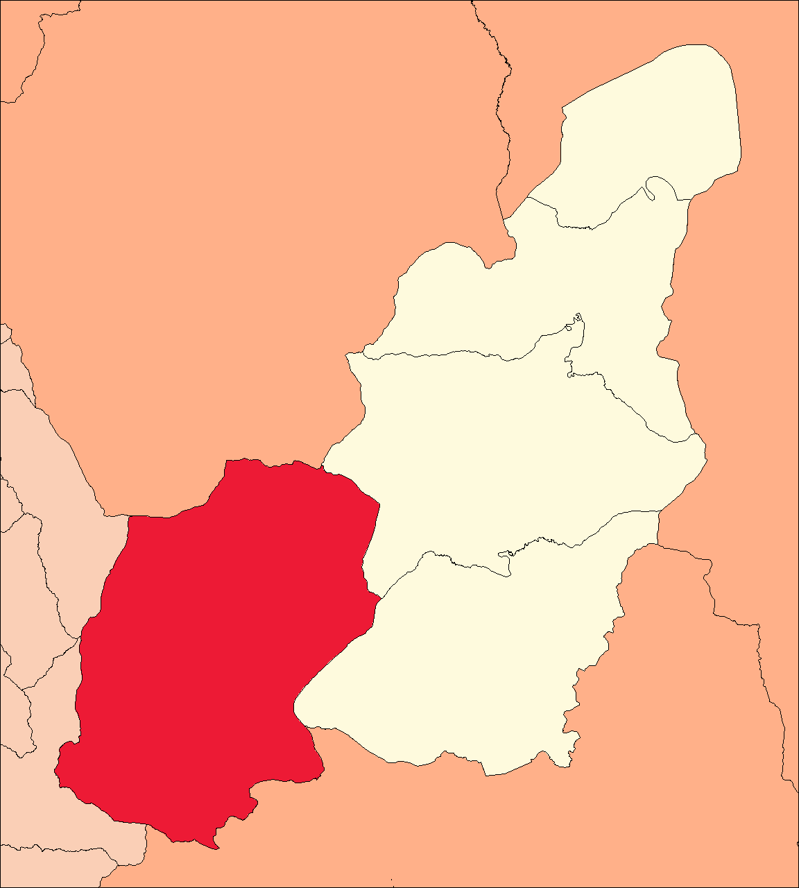 Área del distrito de Codo del Pozuzo.